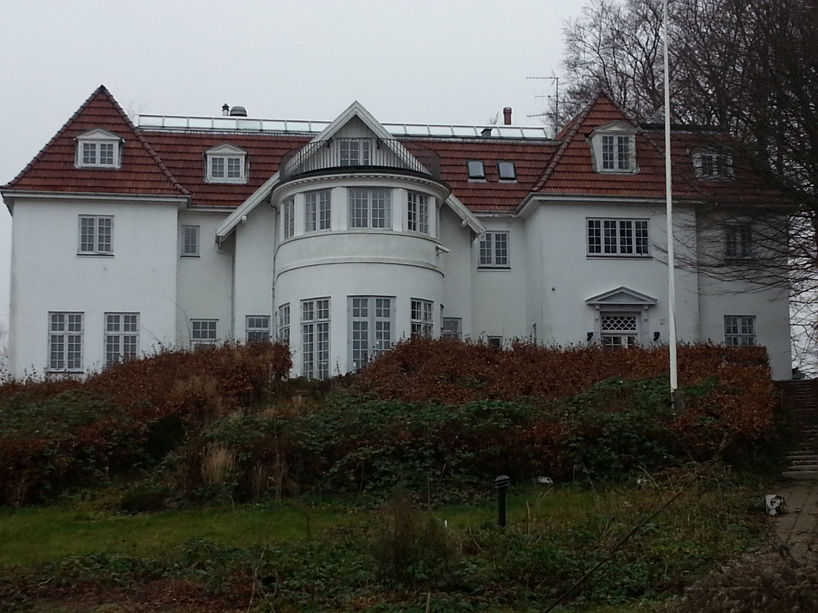 Villa ved Gammel Strandvej i Espergærde.